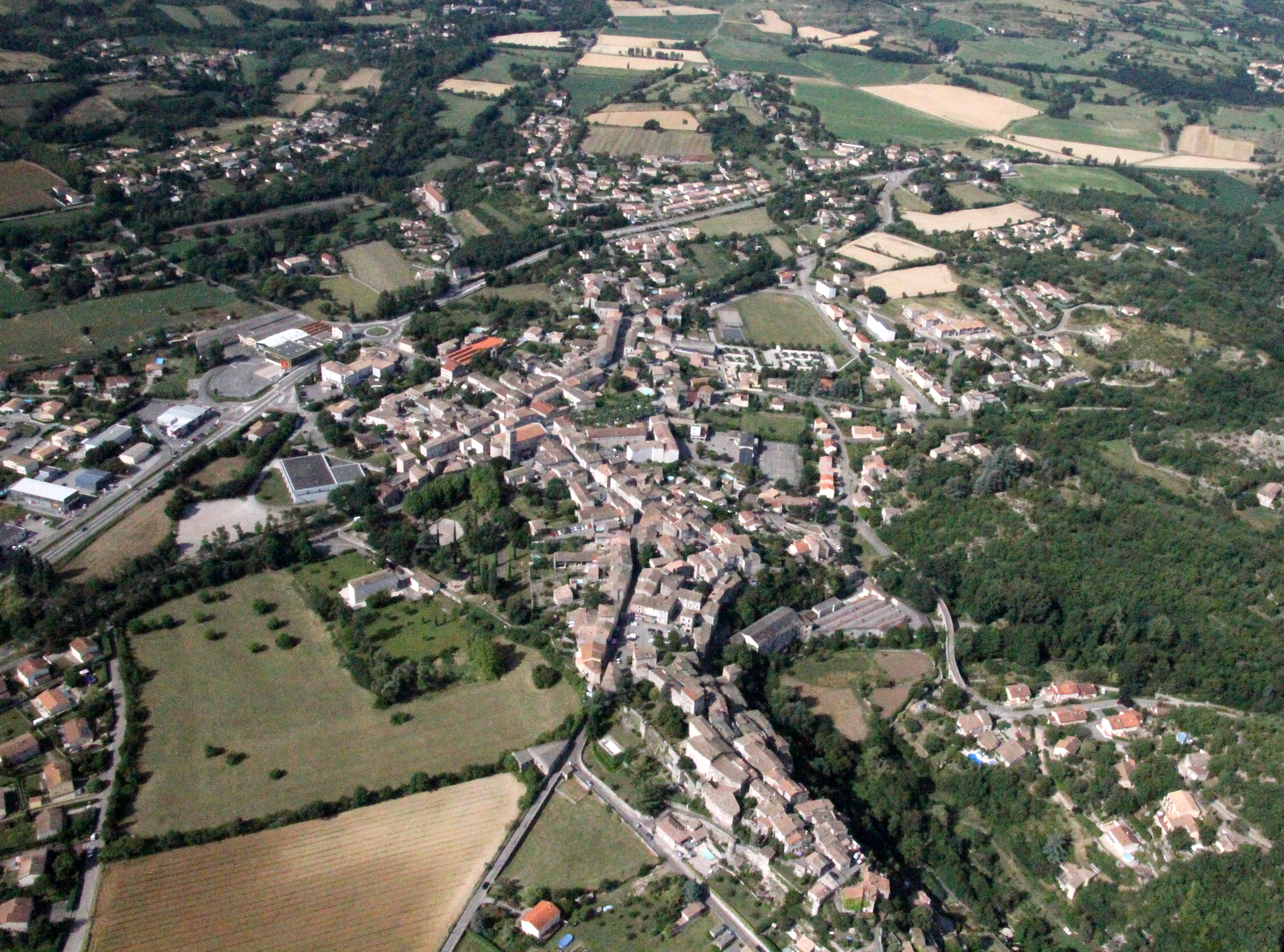 Vue aérienne du village de Chomérac